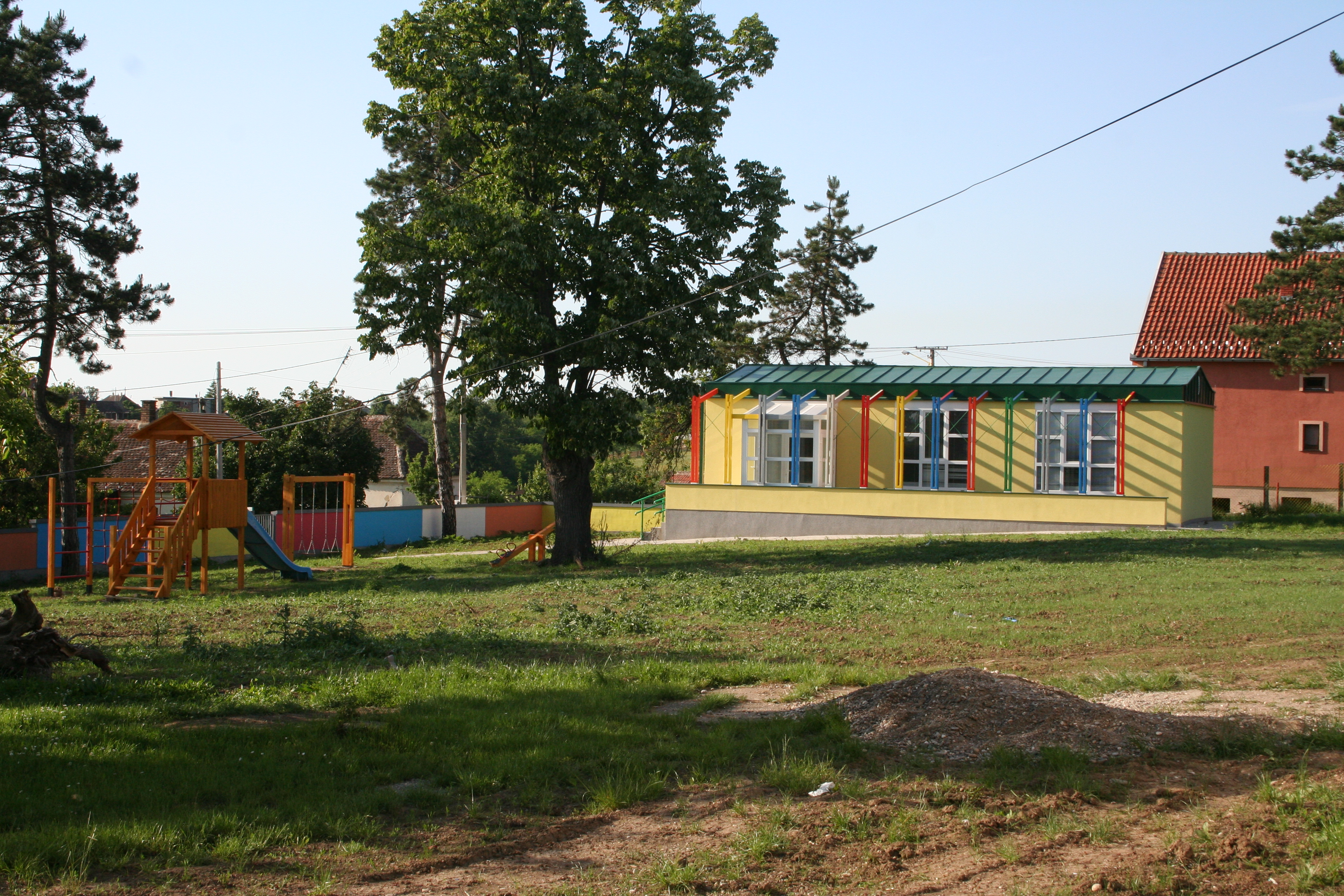 Zgrada vrtića i predškolske ustanove, Jalovik opština Vladimirci